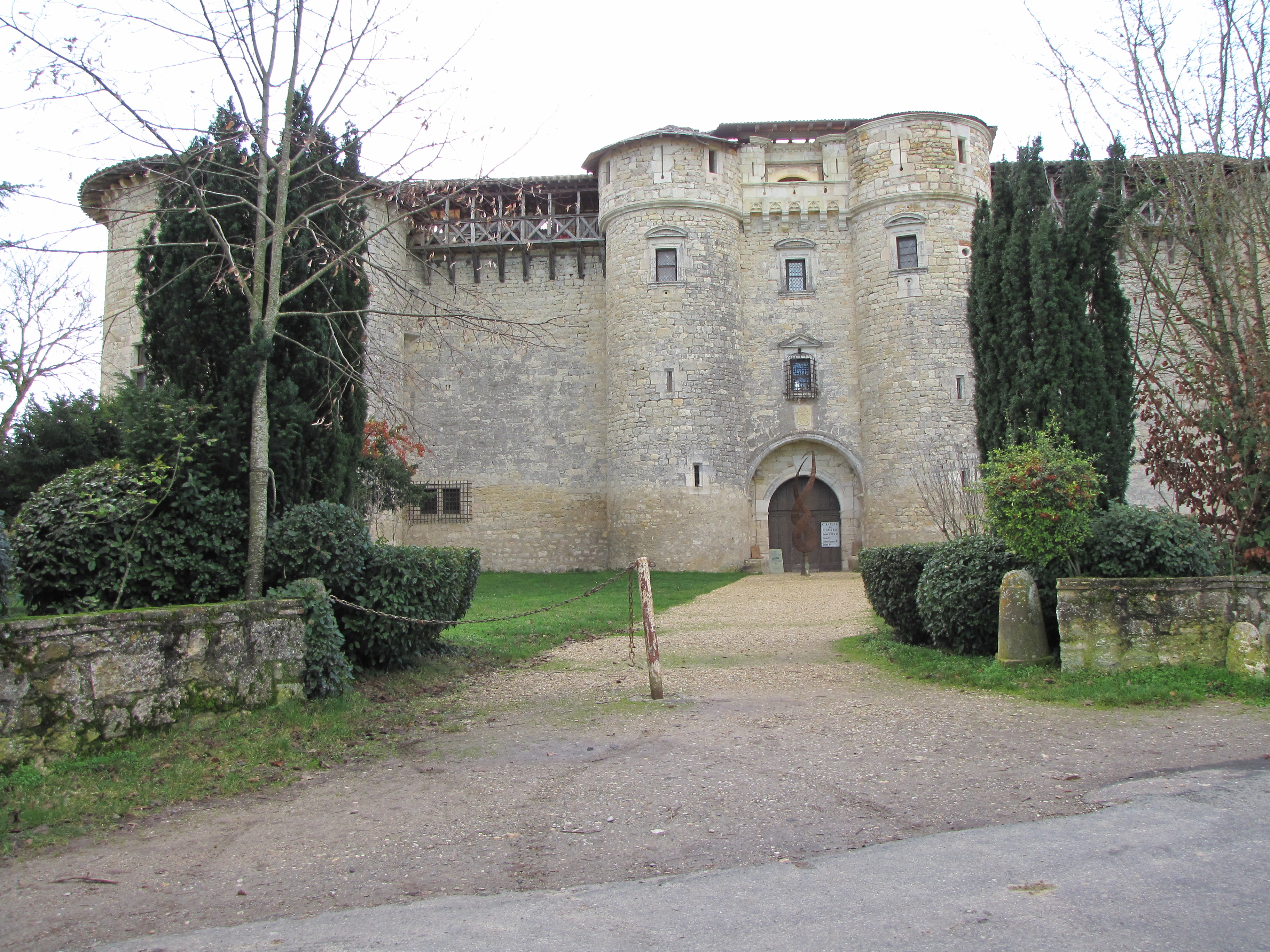 Château de Mauriac commune de Senouillac